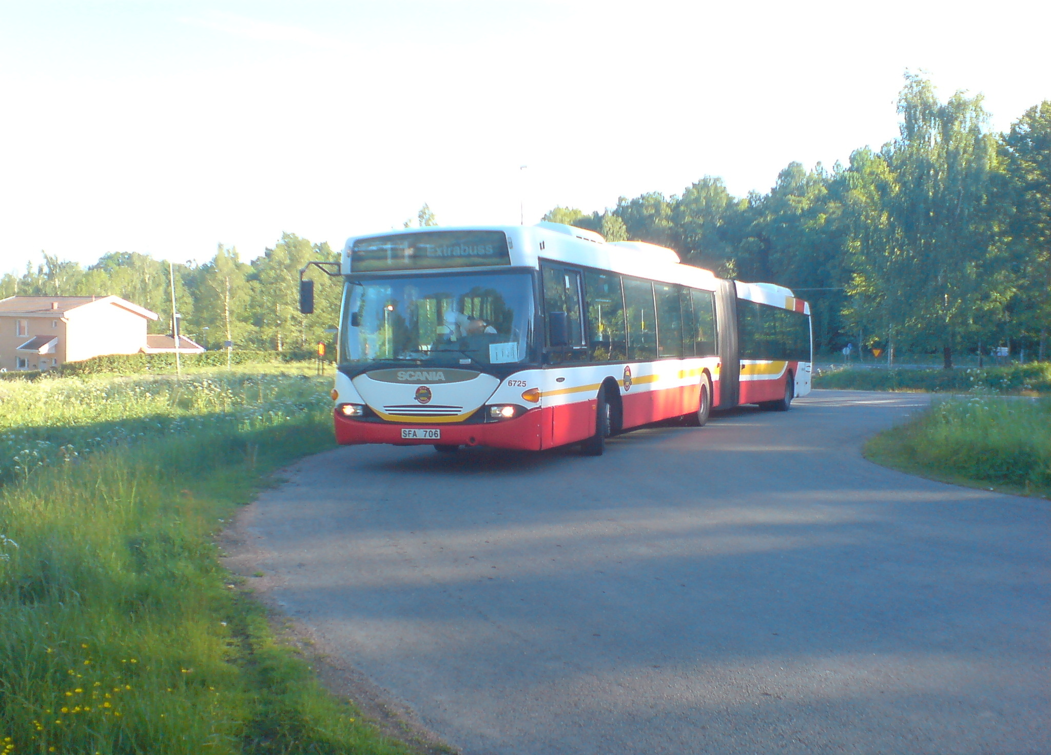 Stombuss (Omnicity) på Linje 11 i Jönköping 30 maj 2009.